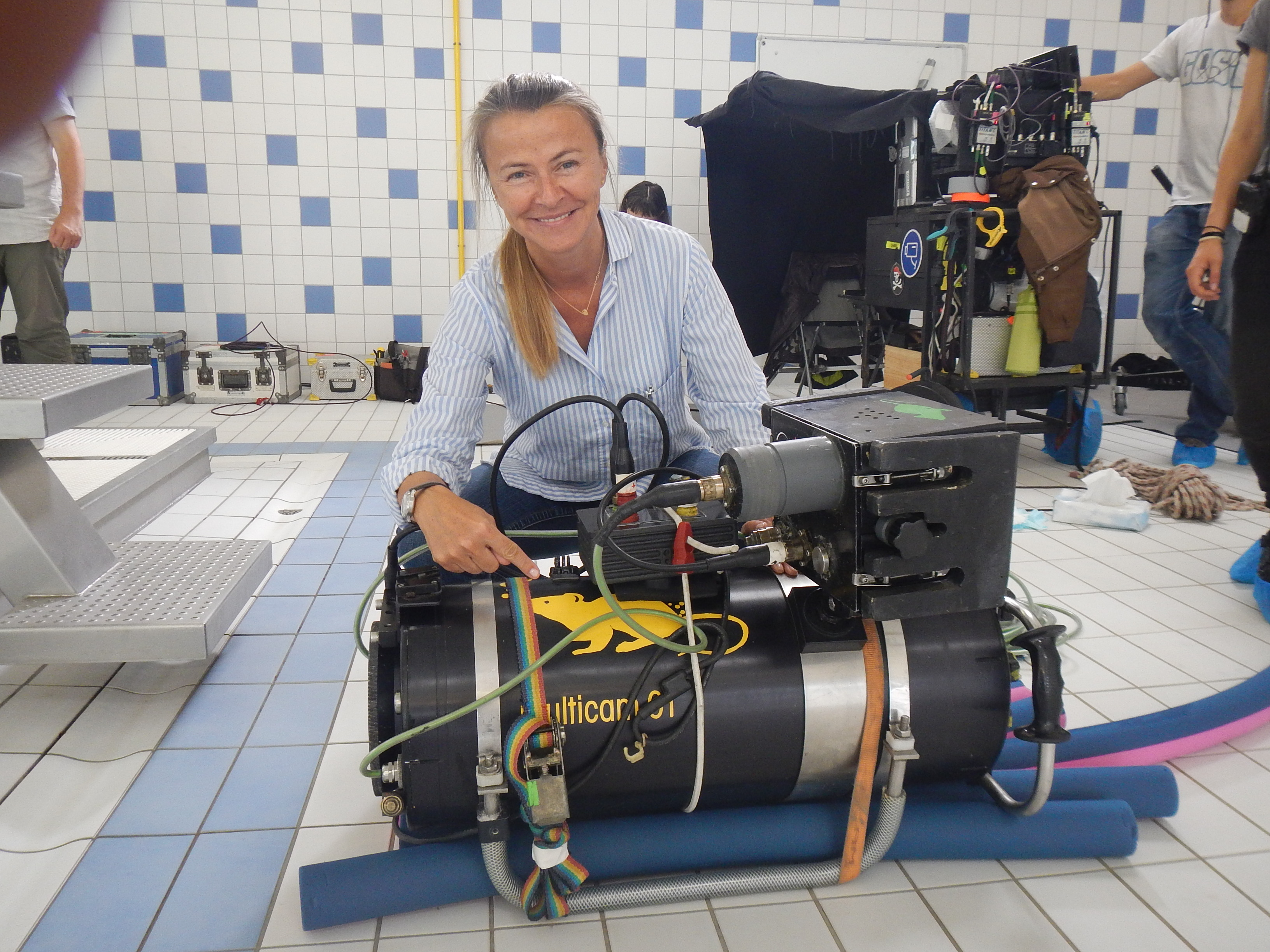 Charlotte Brandstrom